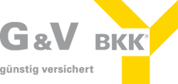 Logo der G&V BKK